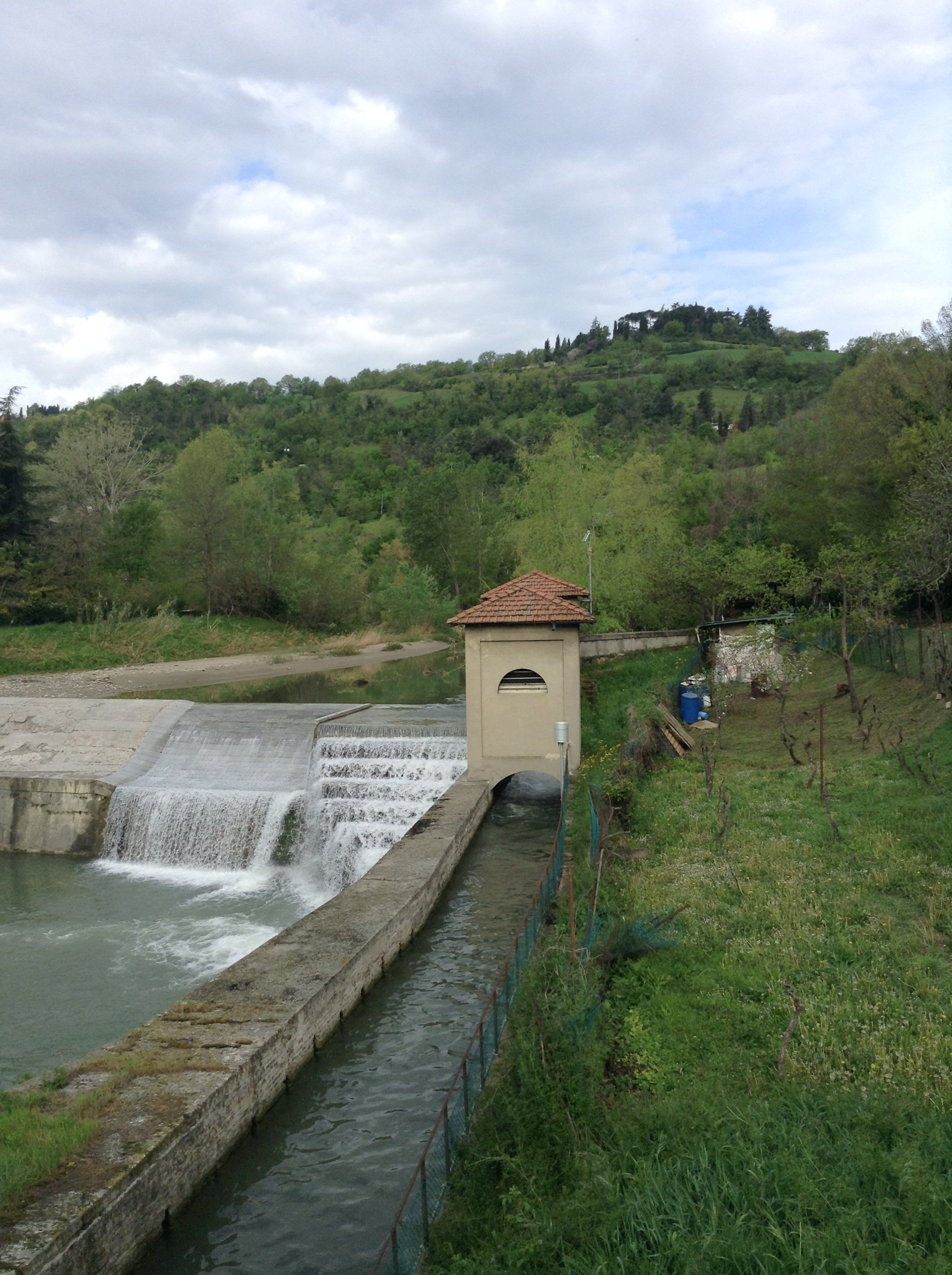 Chiusa di San Ruffillo